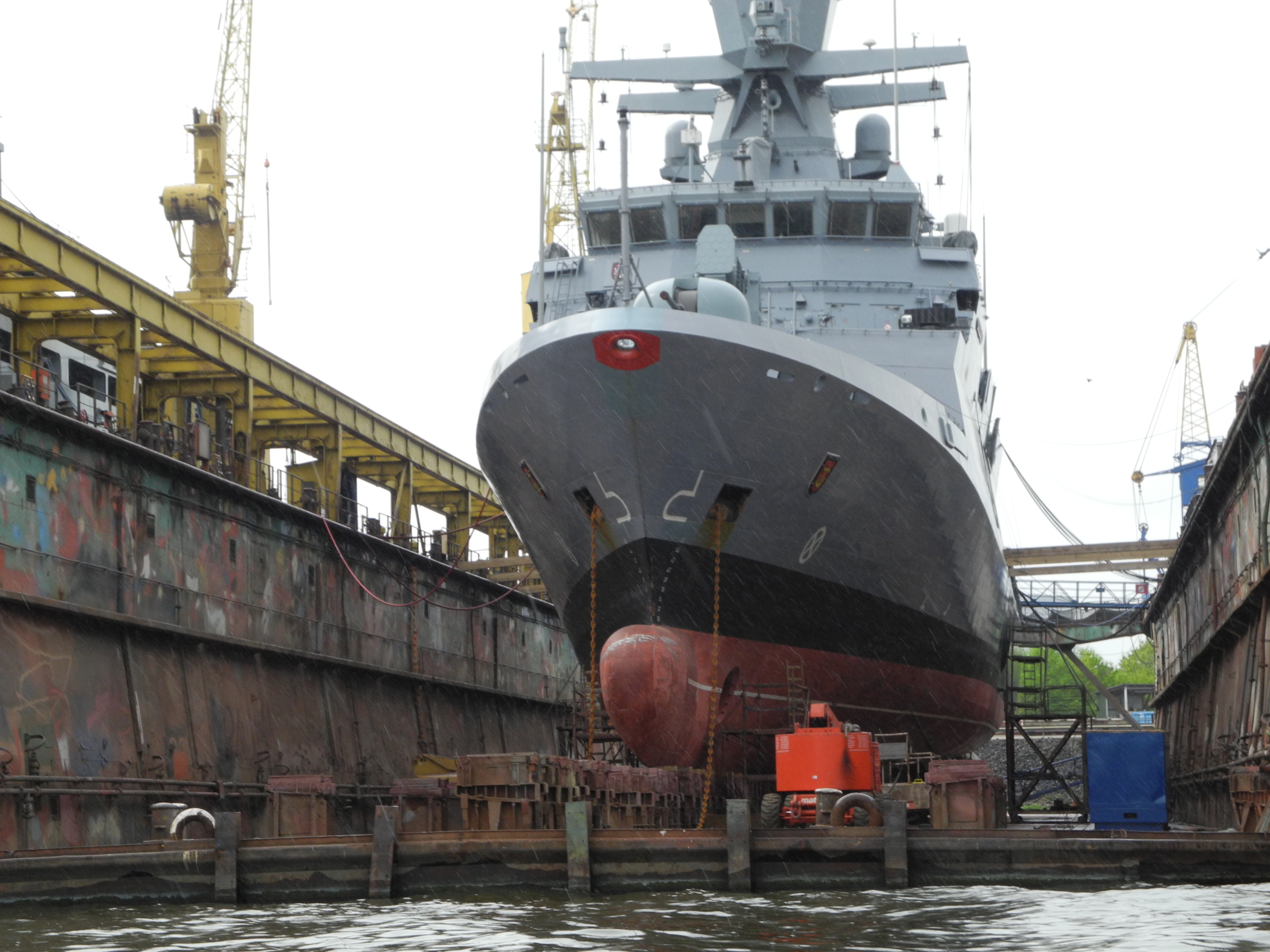 Trockendock - Hafen Hamburg